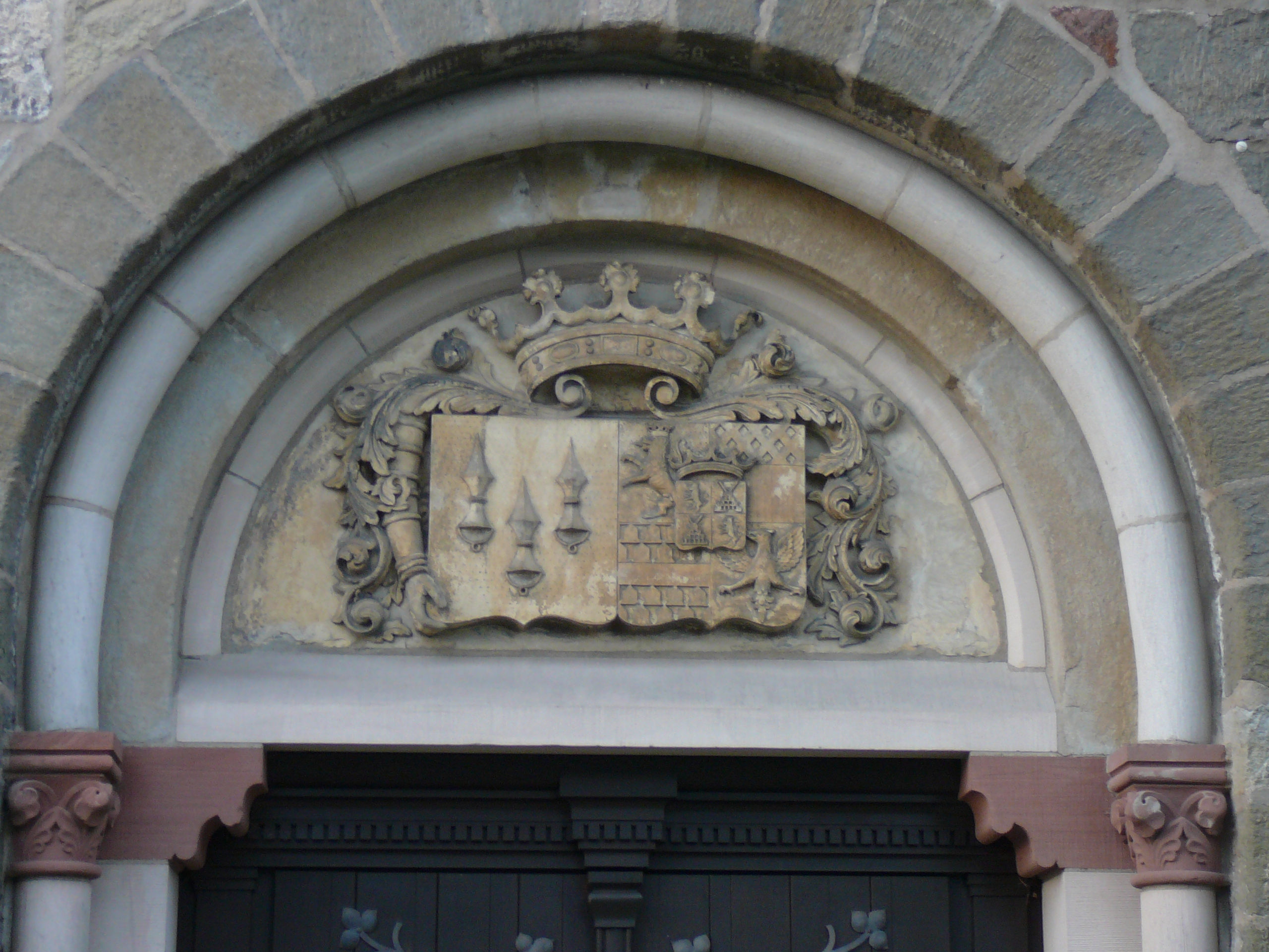 Höhenstraße, Wuppertal